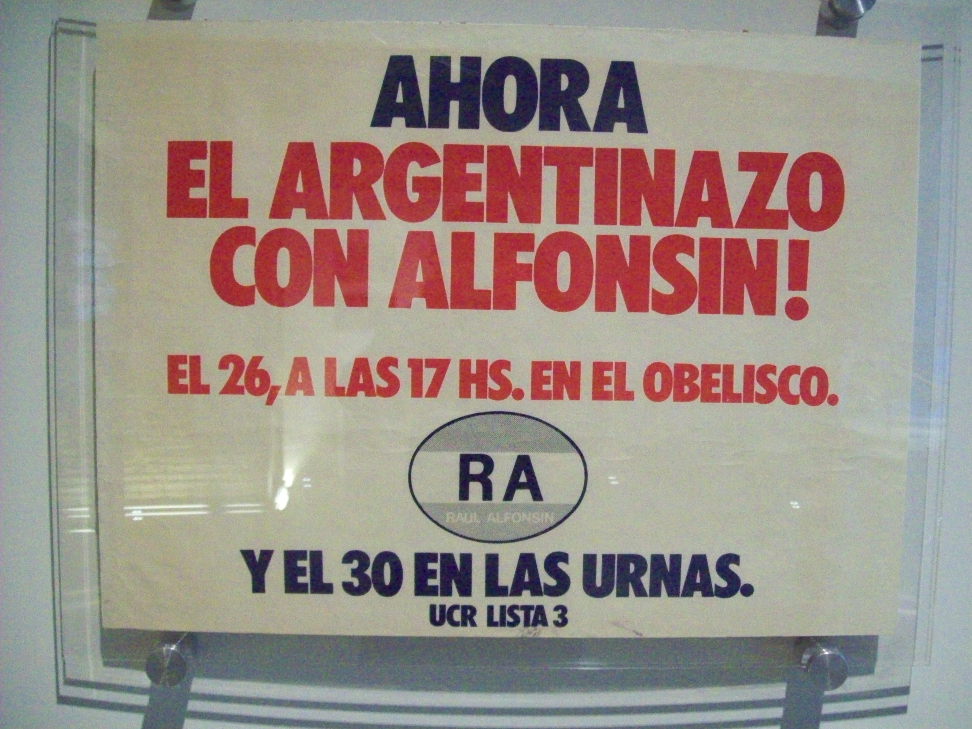 Afiche de la campaña de 1983 de Raúl Alfonsín en el Museo del Bicentenario.